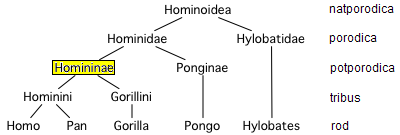 Rodoslovno stablo Hominoida - Homininae